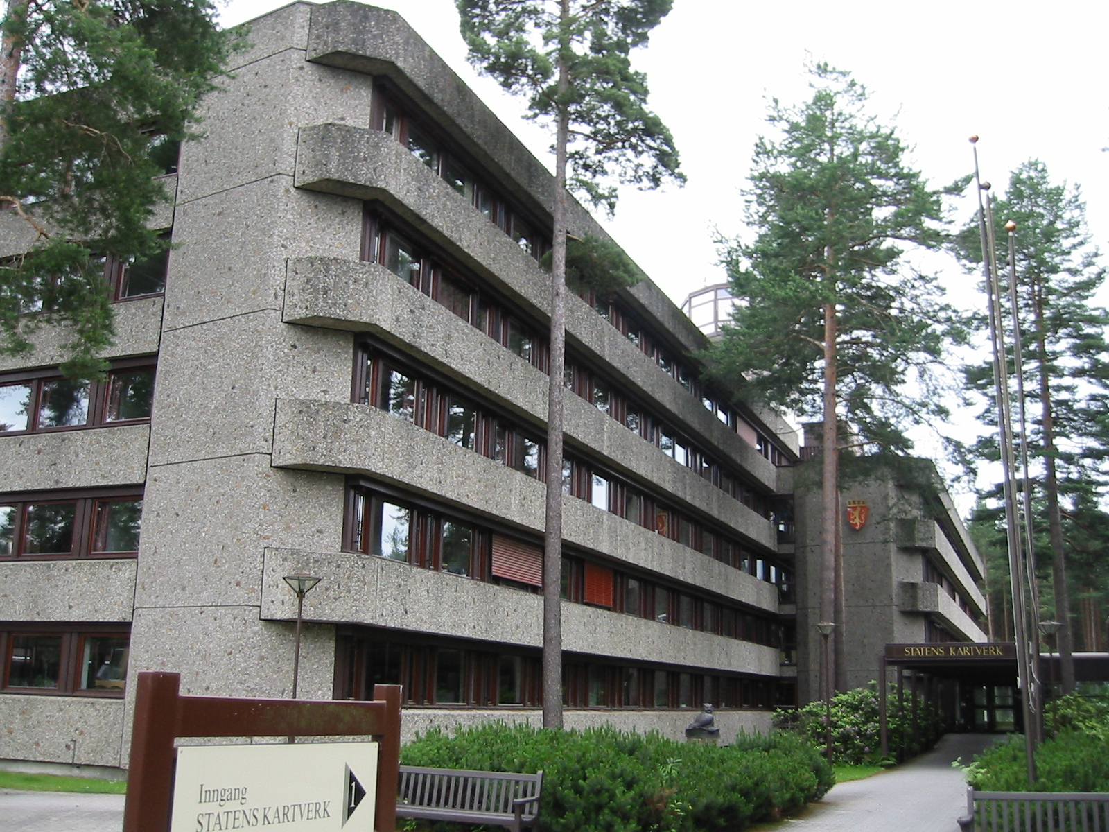 Statens kartverk, Hønefoss, Ringerike, Norway